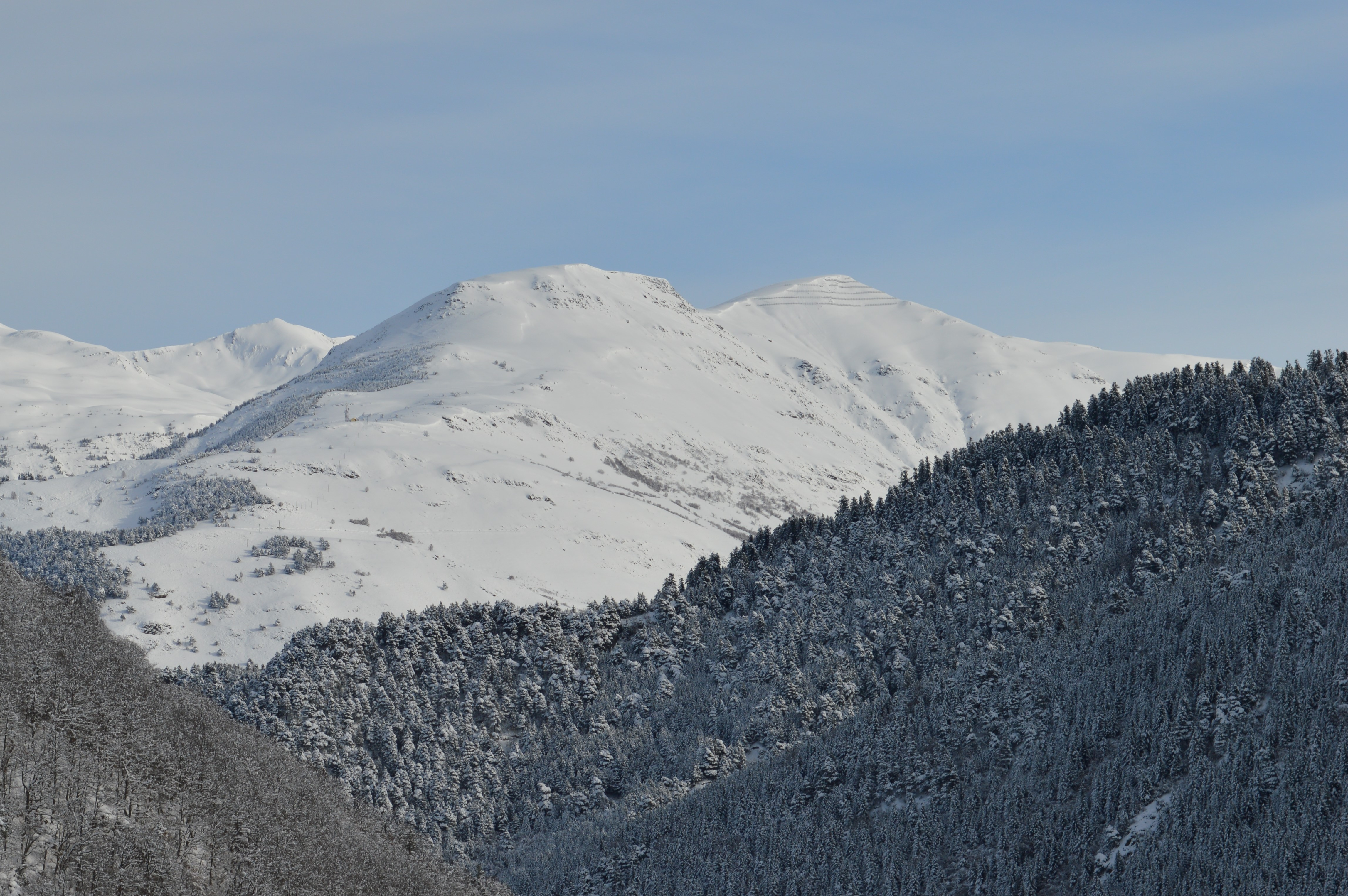 Bonh de Garòs e Tuc der Ombrèr